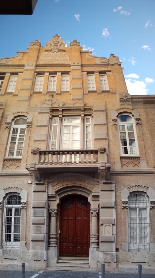 Escuelas Graduadas de Cartagena